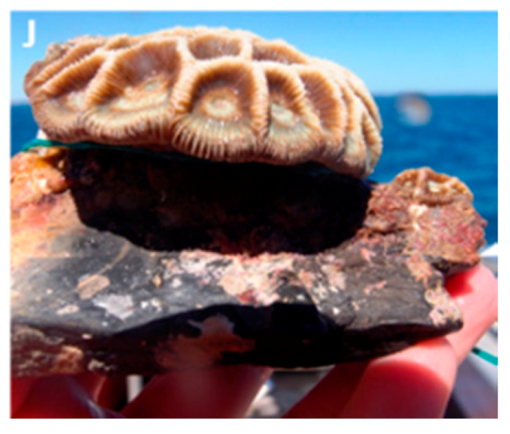 Coelastrea aspera creciendo en un trozo de carbón, en Minden Reef, Australia